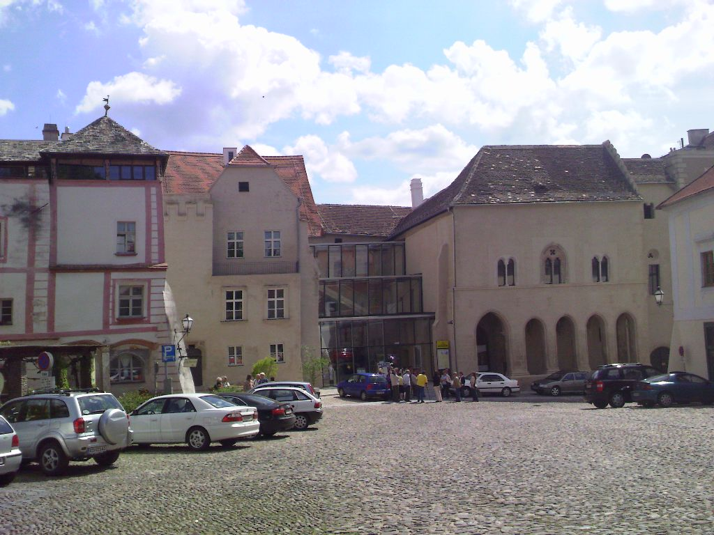 Gozzoburg Krems Aussenansicht